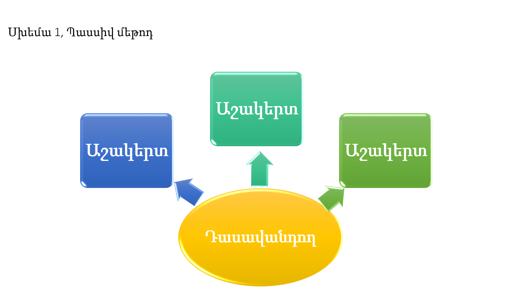 Пассивный метод обучения